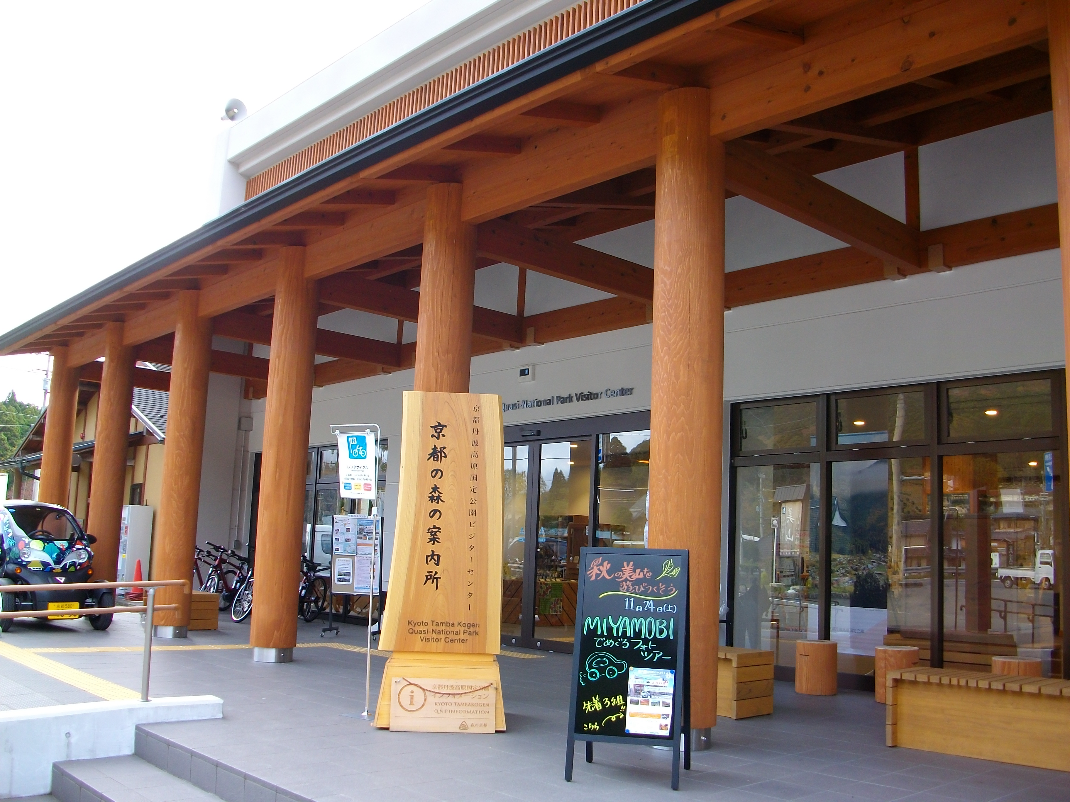 南丹市美山町安掛の道の駅美山ふれあい広場の一角に建てられました。外見には北山杉をふんだんに使っています。